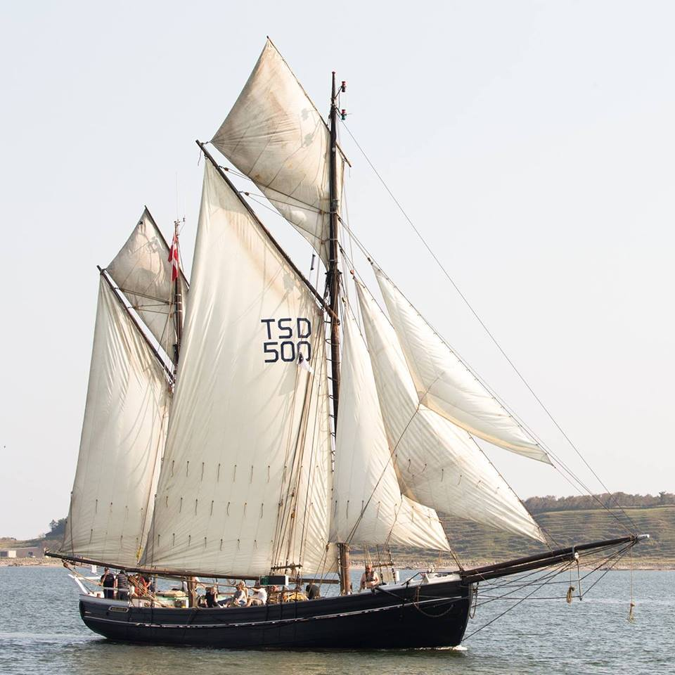 Skibladner II